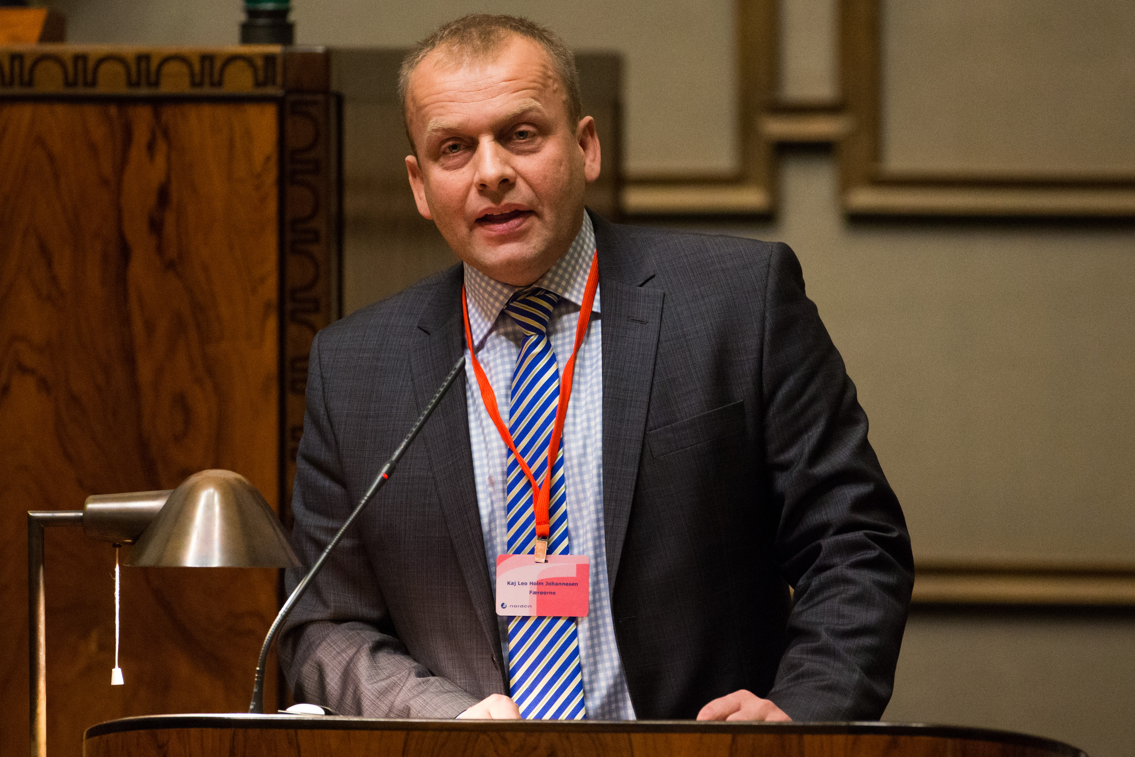 Plenum mötet. Kaj Leo Johannesen